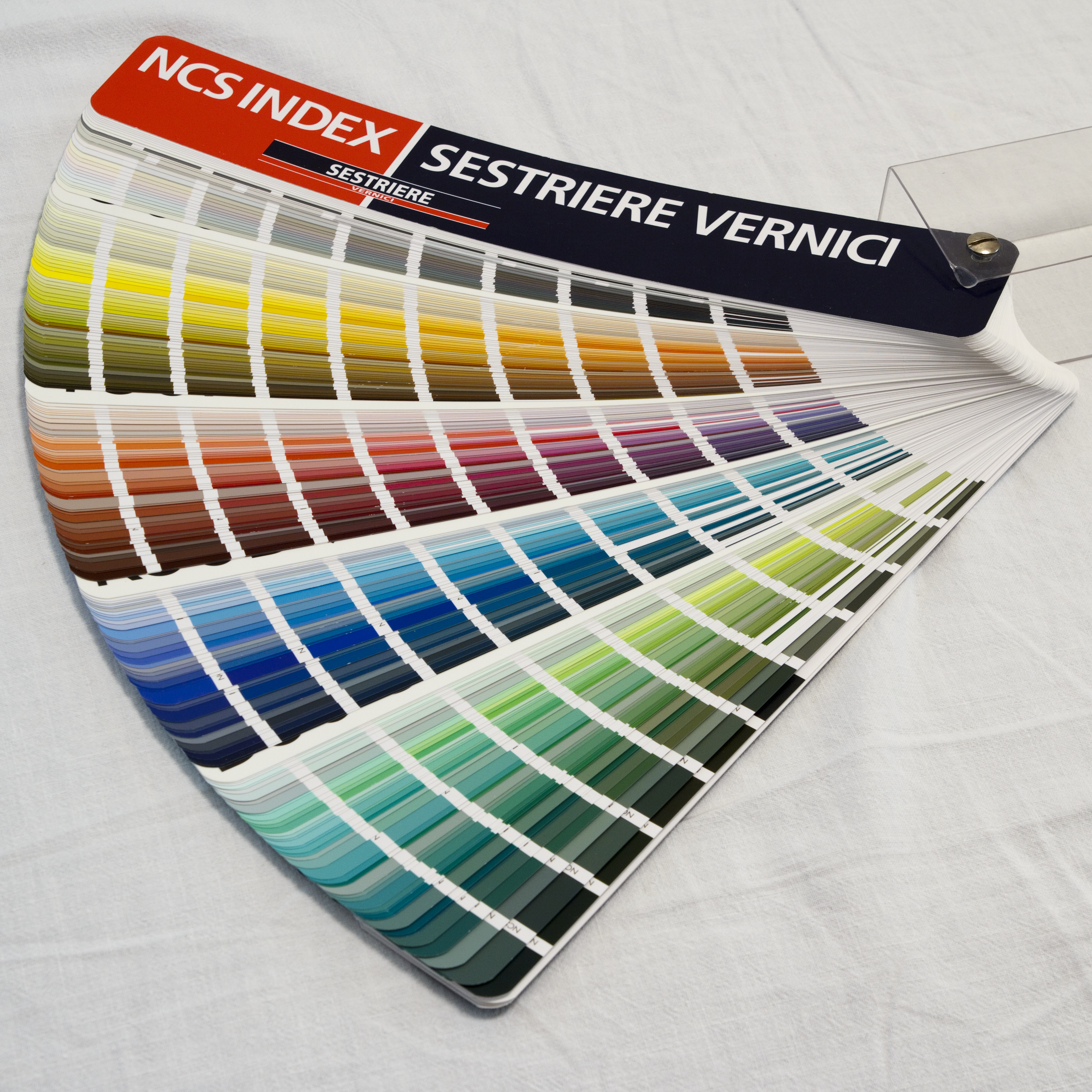 Color Index, Natural Color System, Skandinaviska Färginstitutet AB